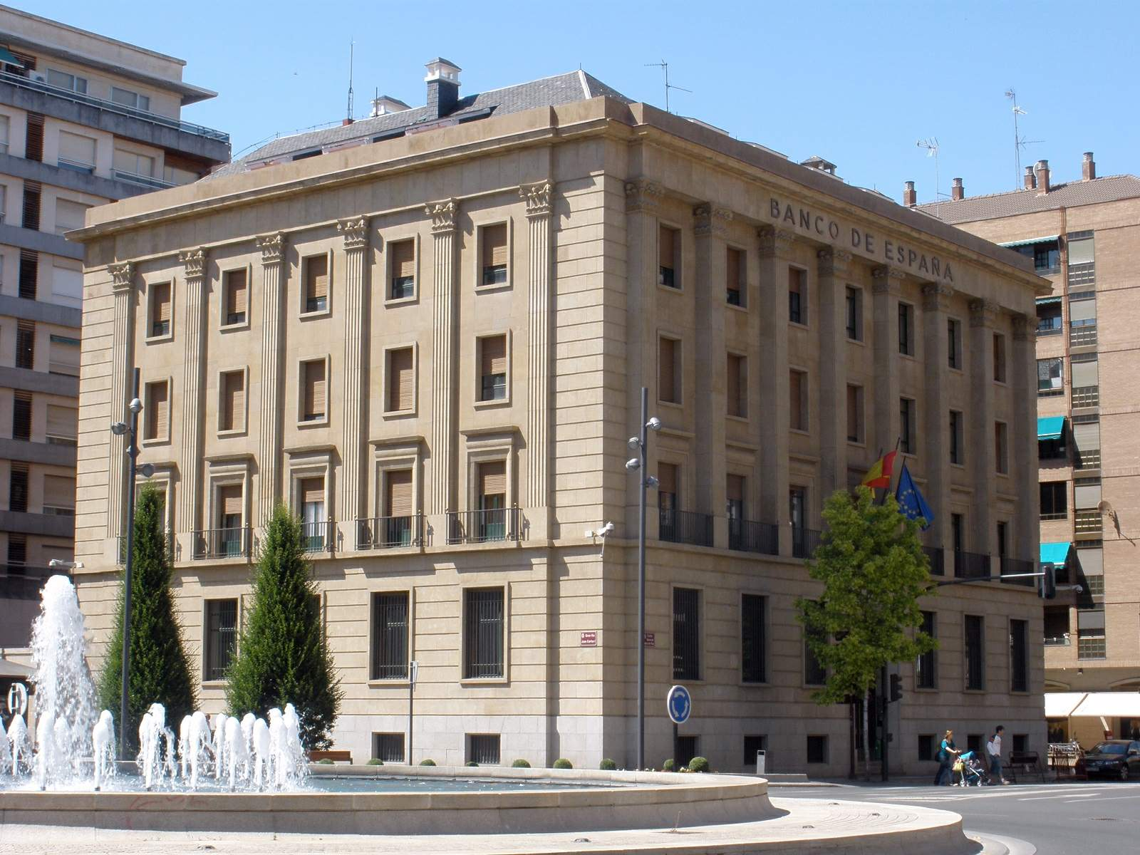 Logroño - Banco de España